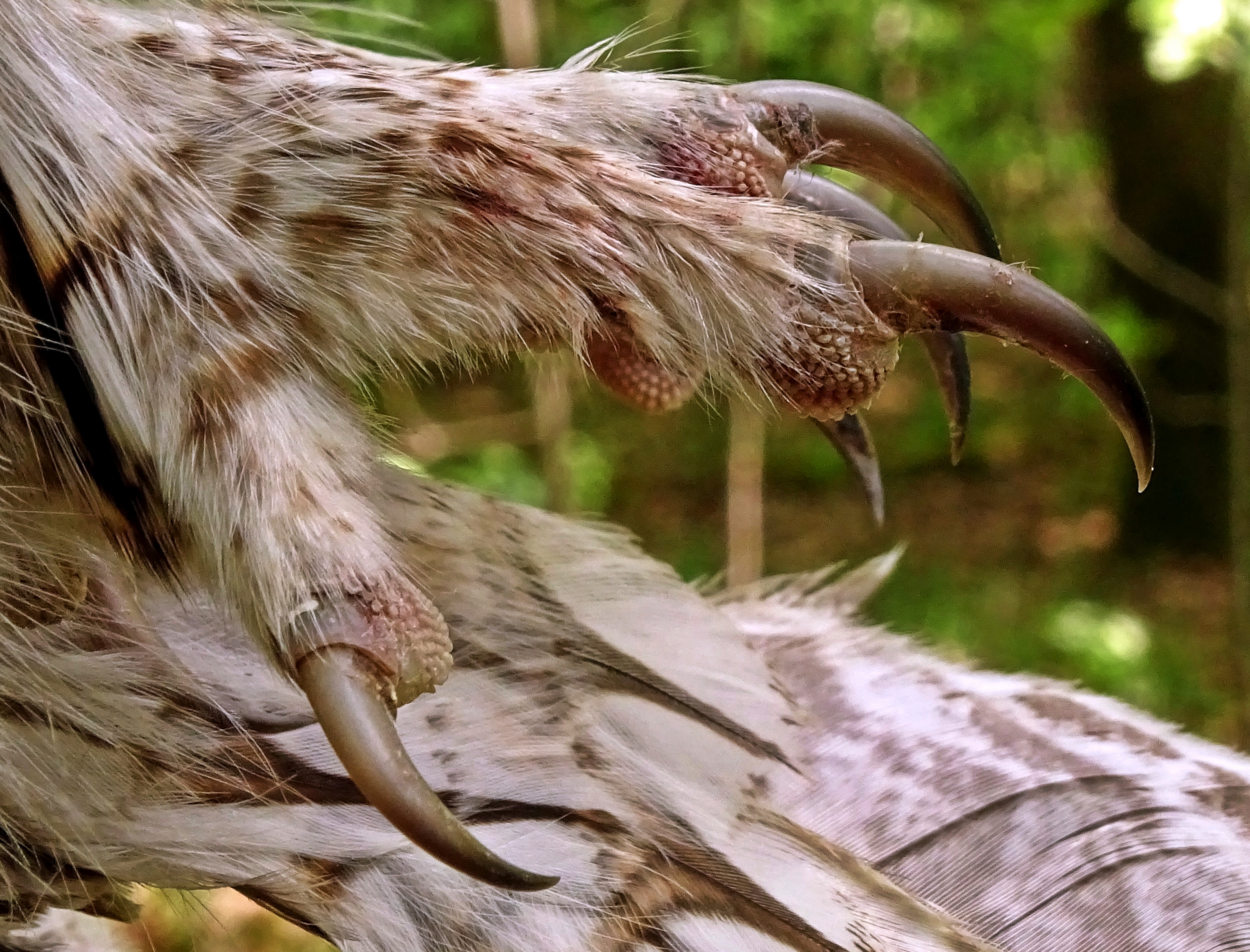 Srpski (latinica): Šumska sova (Strix aluco) je jedna od najbrojnijih vrsta sova u Srbiji. Gnezdi se u svim tipovima šumskih staništa i na svim nadmorskim visinama, ipak, najbrojnija je u starim listopadnim šumama. Populacija je ocenjena kao stabilna. Stanarica je.